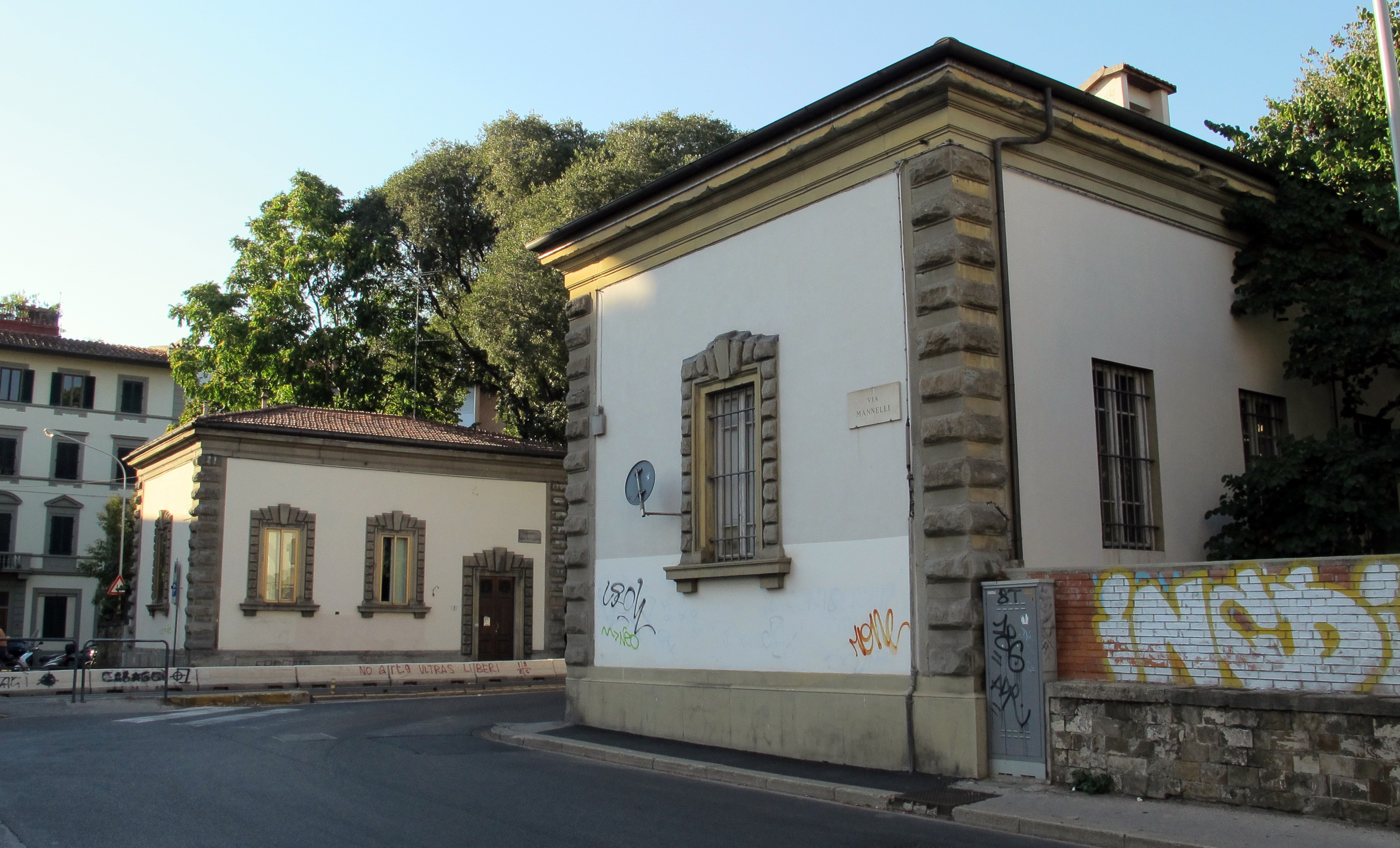 Piazza Vasari (Firenze)